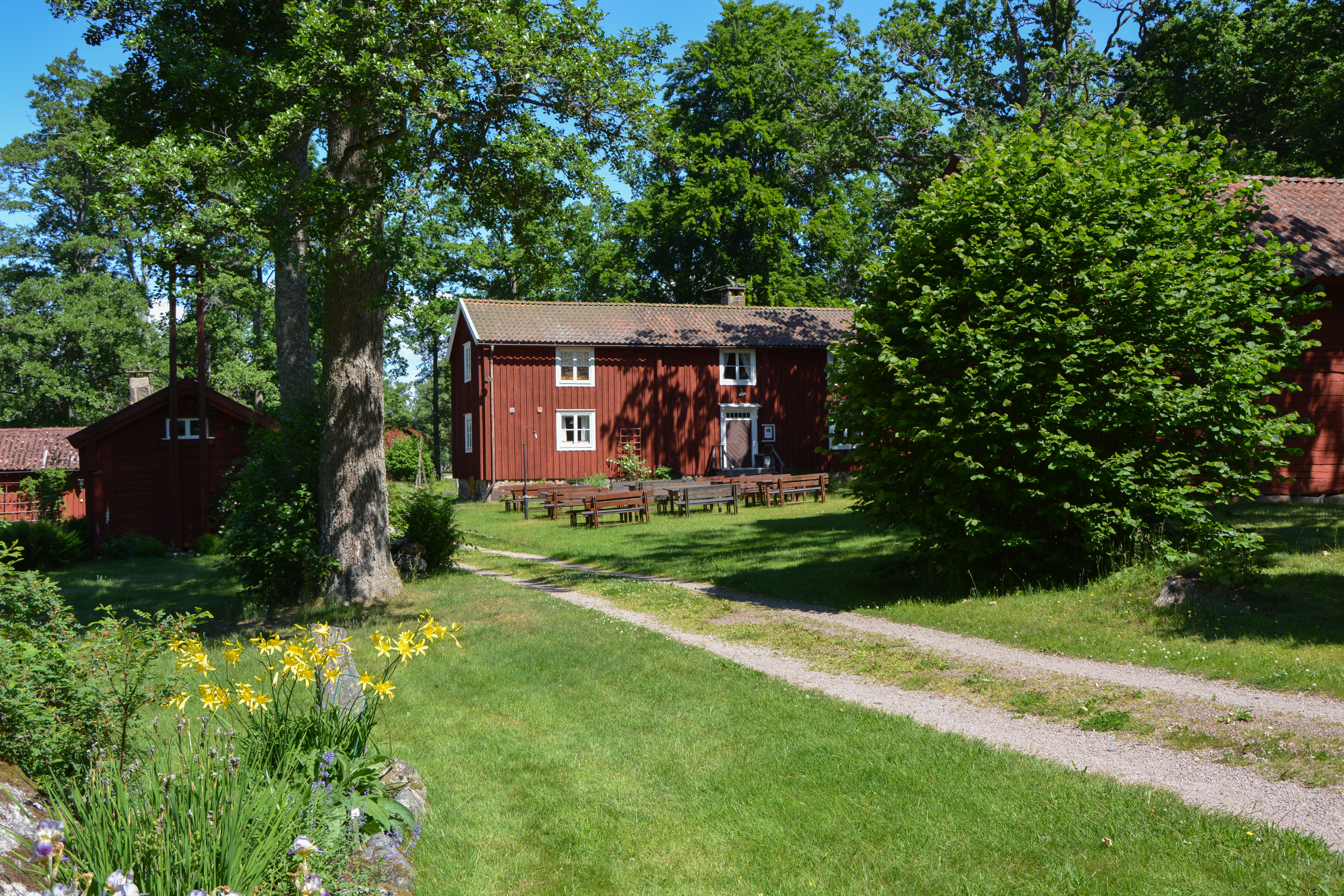 Braås hembygdsgård